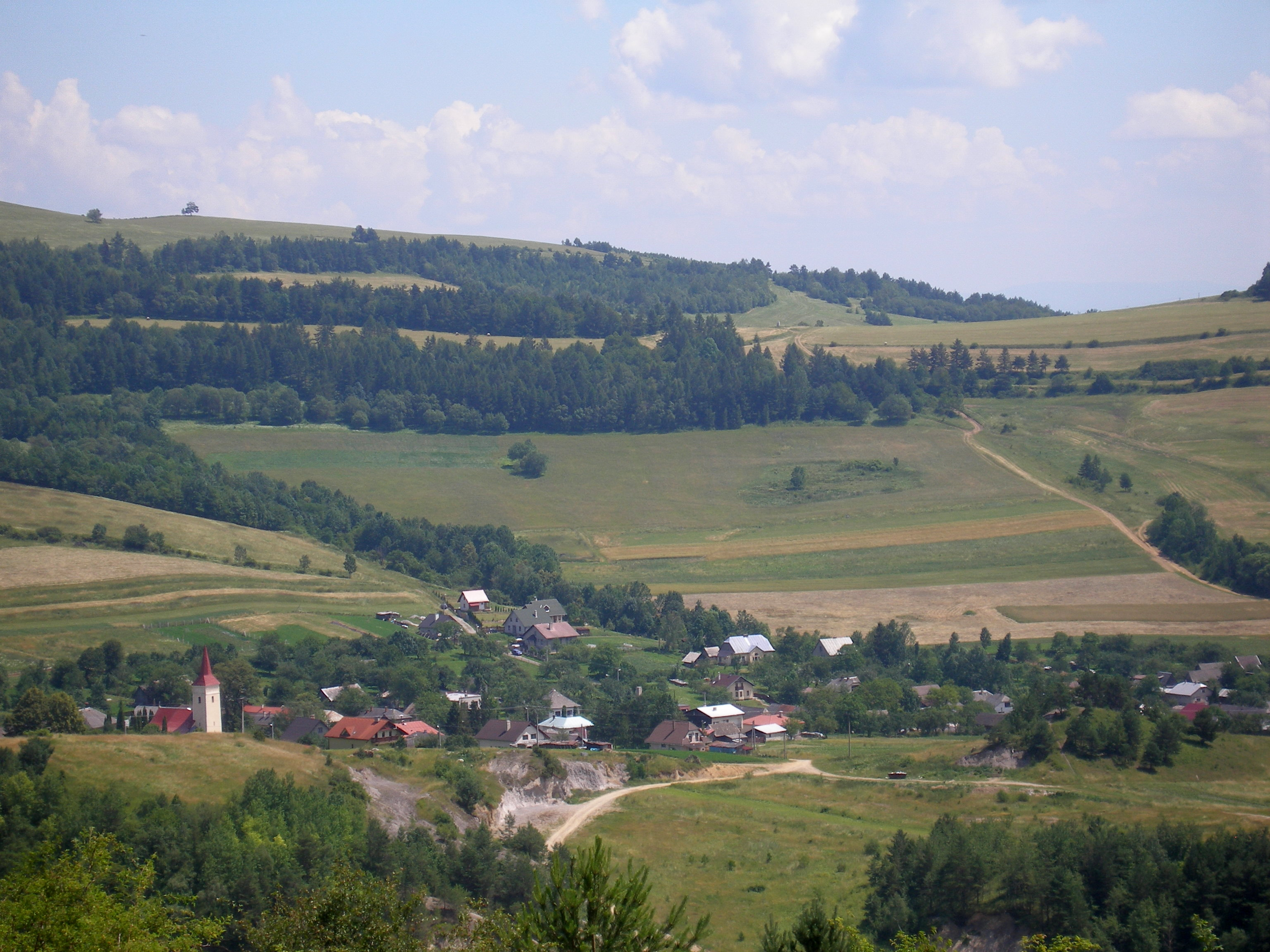 Chotár obce Lipovce okres Prešov.